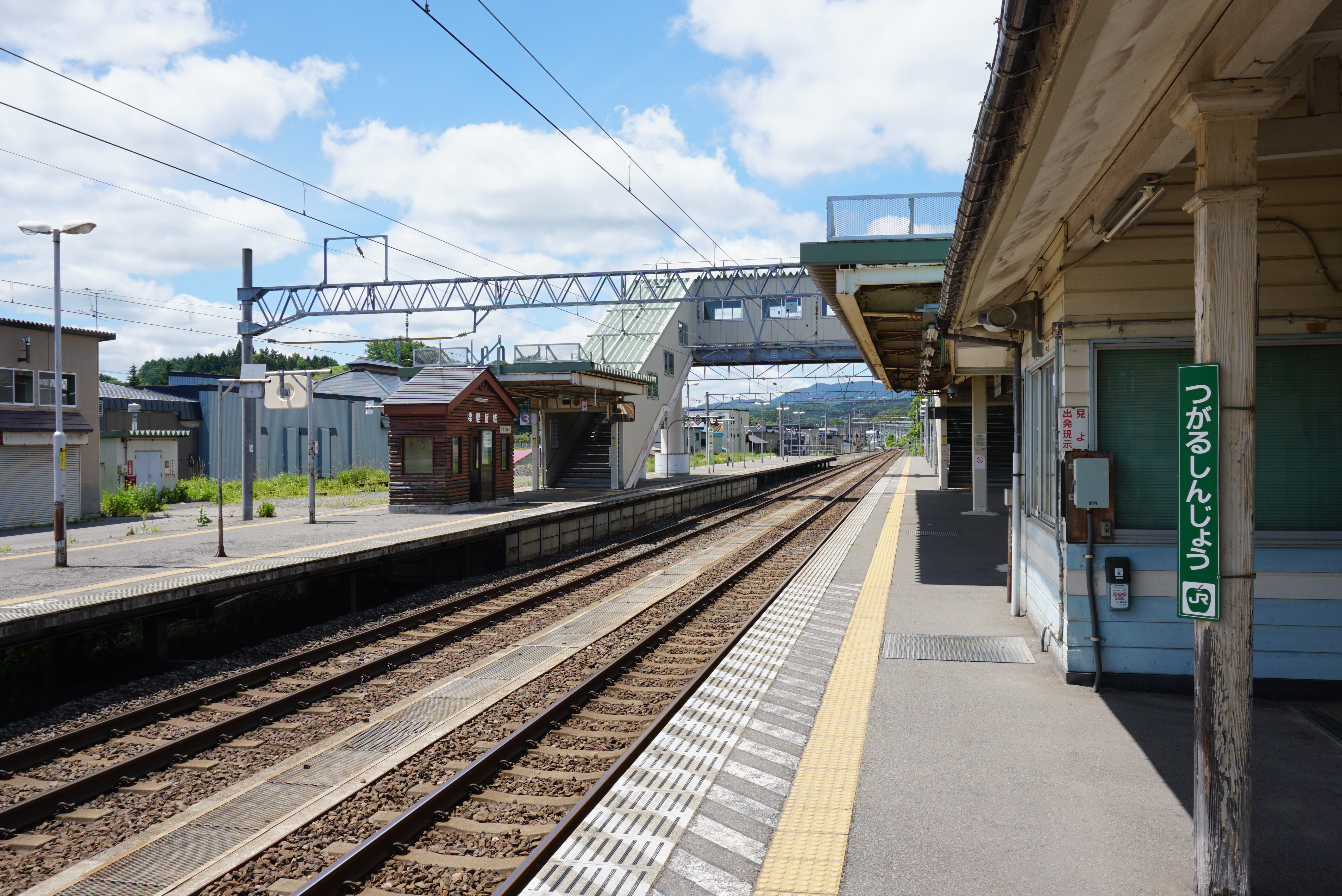 奥羽本線 津軽新城駅（青森県青森市）